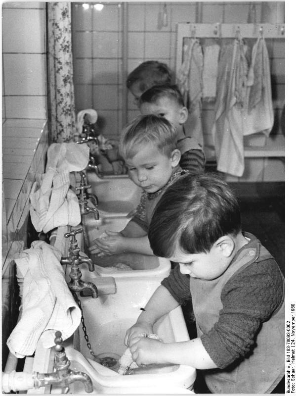 LPG Schenkendorf, Waschraum der Kinderkrippe Zentralbild Schaar 24.11.1960 Zum VI. Deutschen Bauernkongreß 460.000 DM für soziale und kulturelle Einrichtungen Kulturelle und soziale Einrichtungen im Werte von 460.000 DM wurden in den letzten Jahren in der LPG "7.Oktober" in Schenkendorf (Kreis Delitzsch) geschaffen. Drei modern eingerichtete Kinderkrippen und drei Kindergärten, eine Wäscherei, gefließte Wasch-, Dusch- und Badeanlagen stehen den Mitgliedern der LPG zur Verfügung. UBz: Blick in den Waschraum der Kinderkrippe in Schenkendorf.